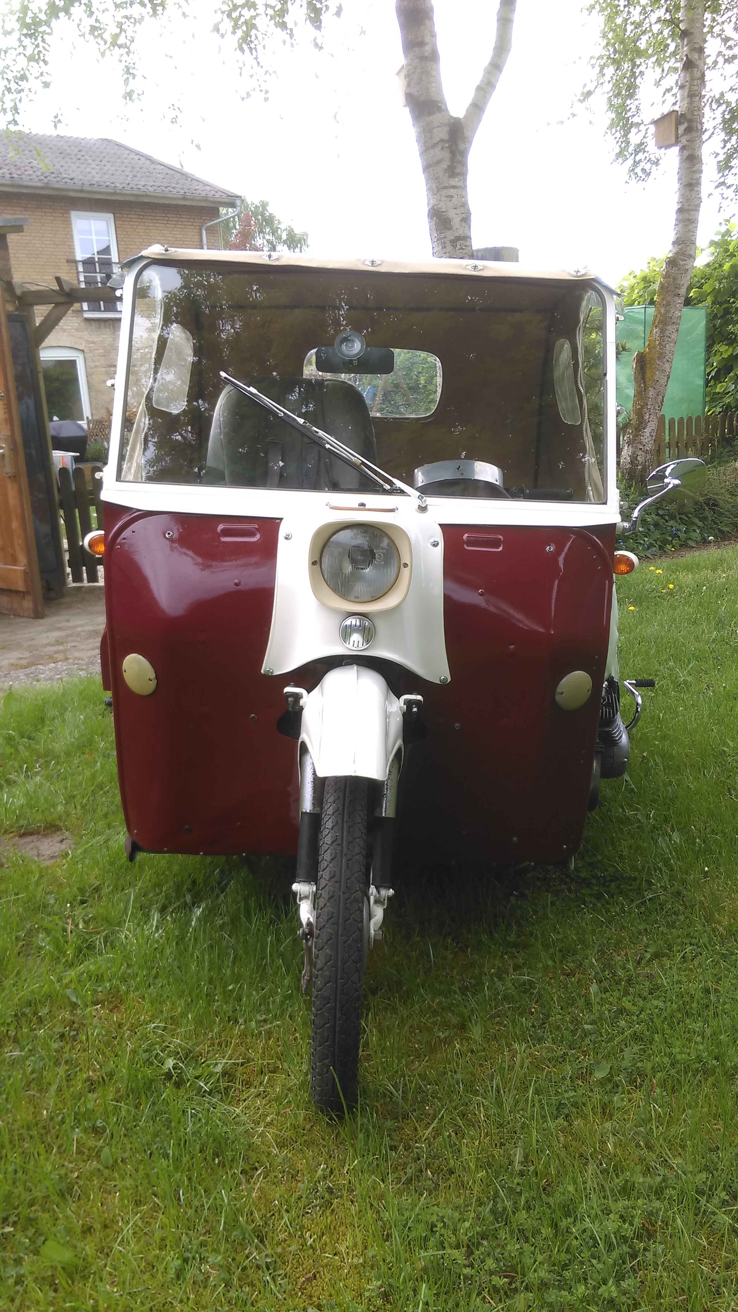 Krause Piccolo Duo/2, Baujahr 1965, restauriert und in alternativer Farbe lackiert (Orig.farbe: blau)